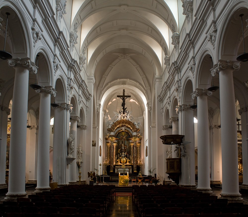 Kerk Saint-Barthélem. Zicht op schip.